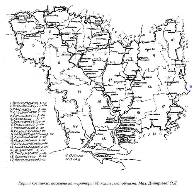 Карта